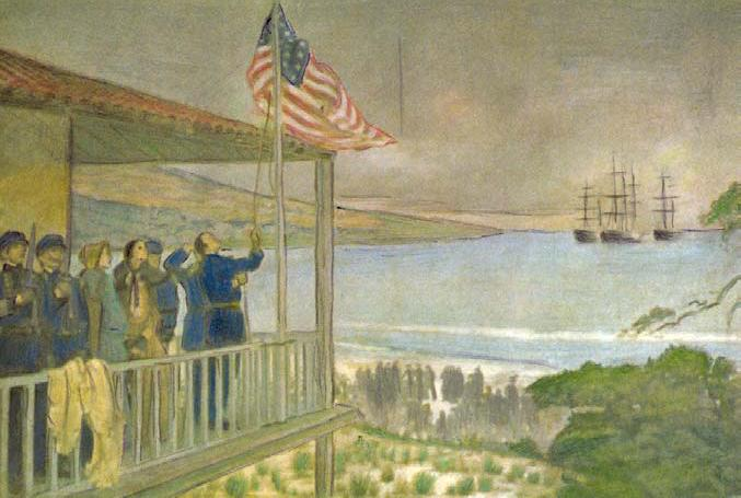 Oficiales del comodoro John D. Sloat izando la bandera estadounidense el 7 de julio de 1846 en Monterey, California.